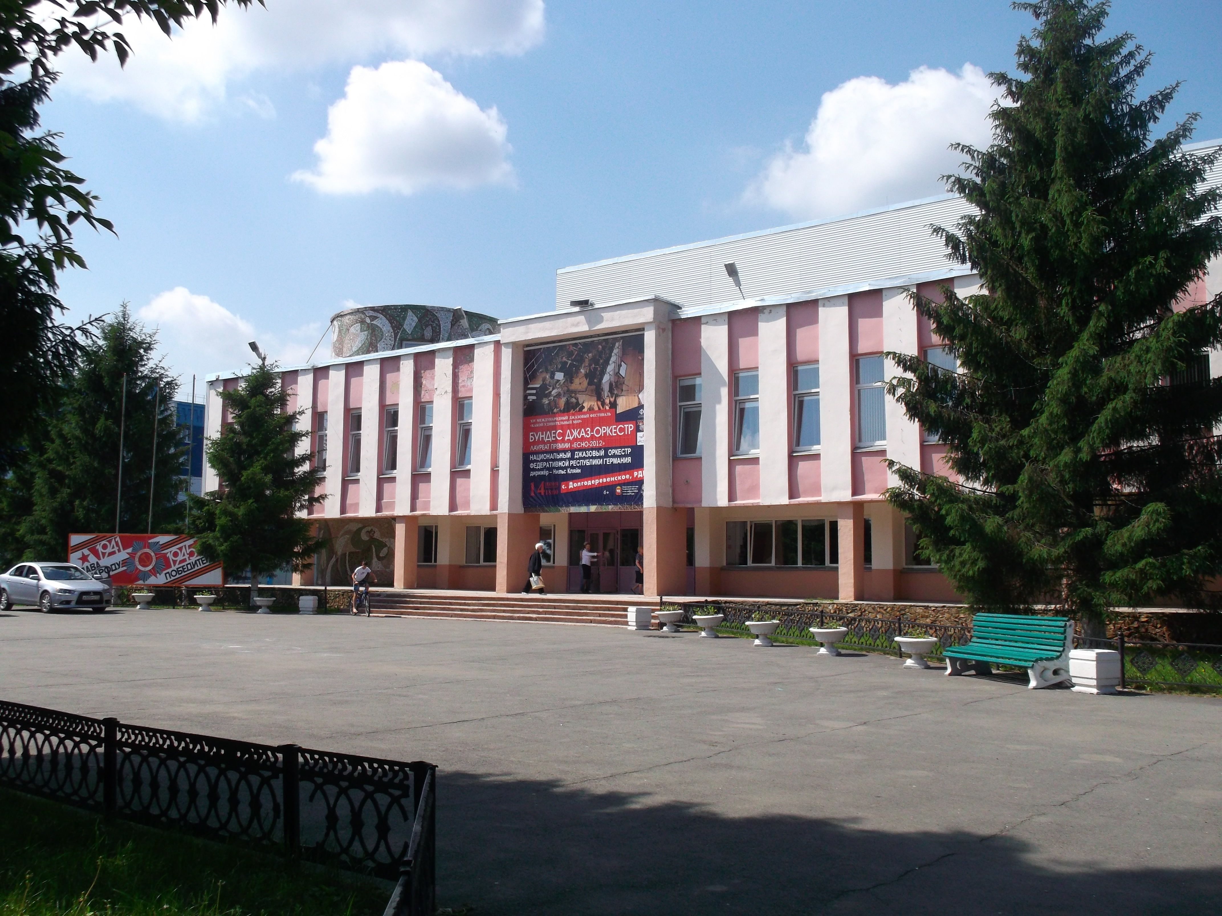 село Долгодеревенское